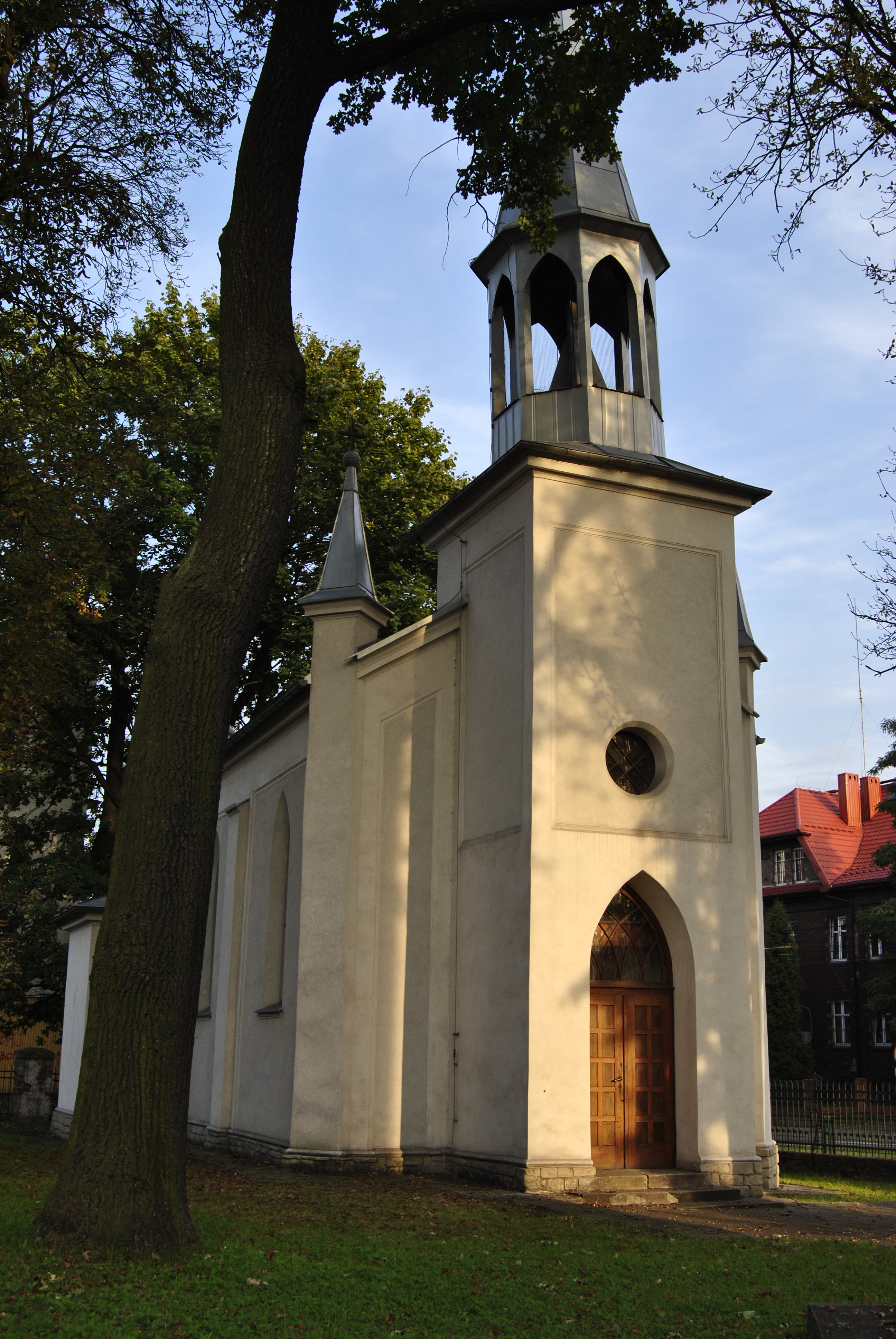 Bytom, kaplica pw. Matki Boskiej, 1854